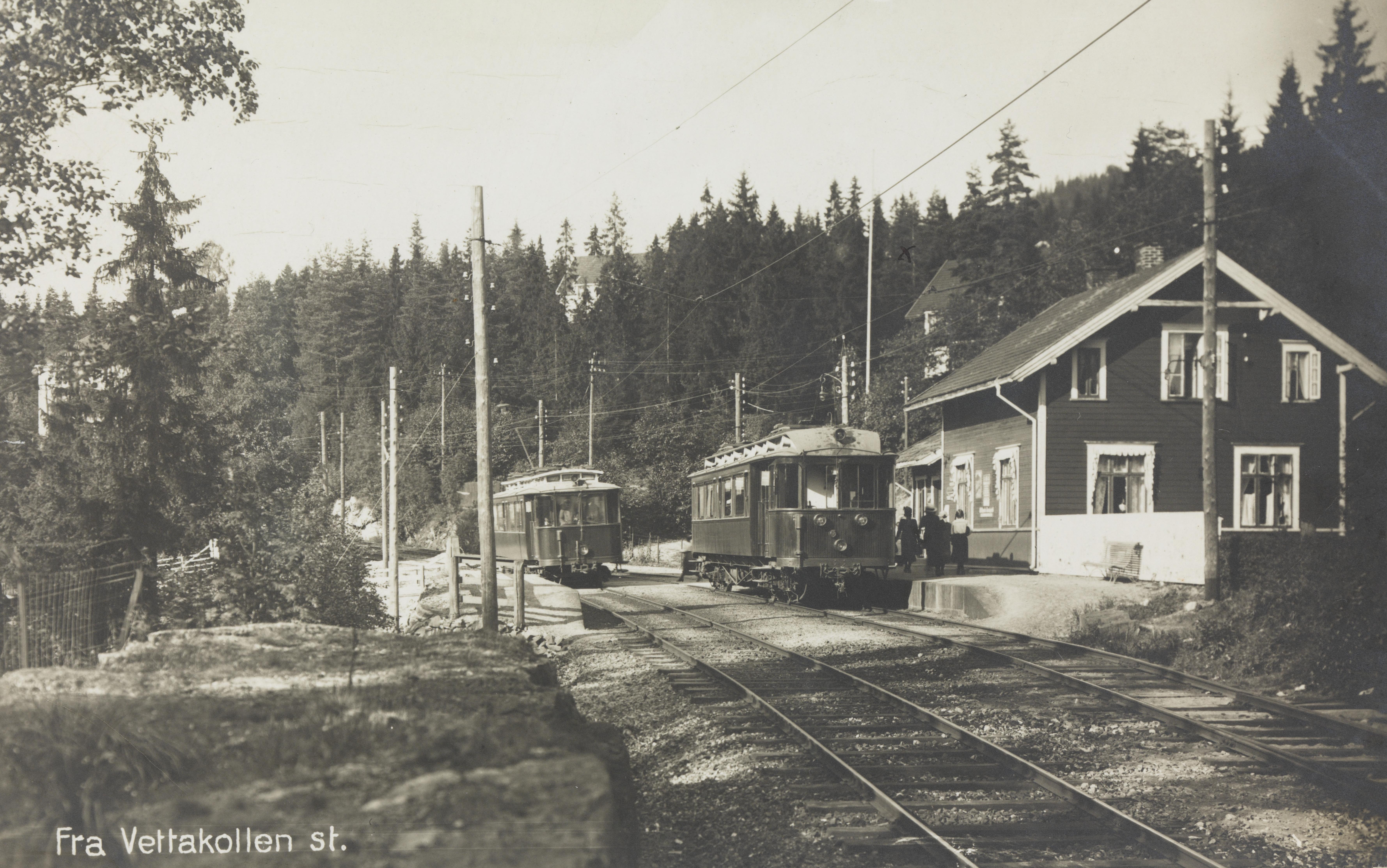 Bildet er hentet fra Nasjonalbibliotekets bildesamling Vettakollen,Vettakollen stasjon, Oslo, Oslo